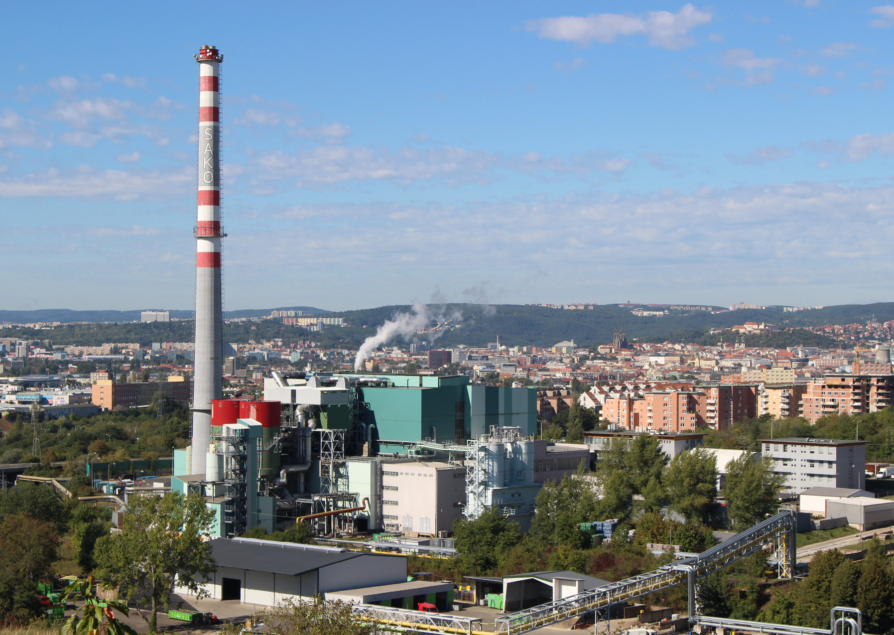 Spalovna komunálních odpadů, Jedovnická 2, Brno